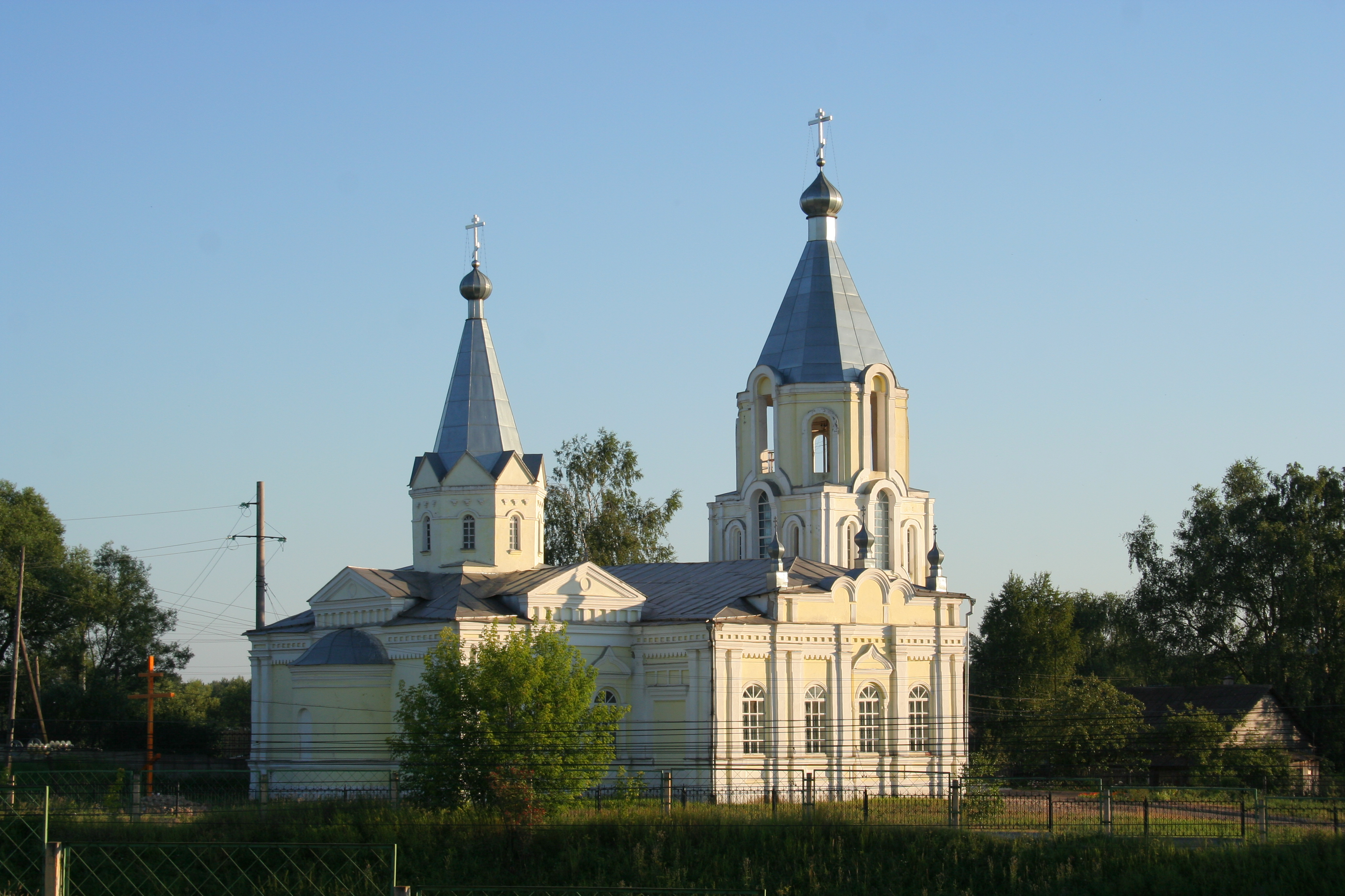 Stadt Lichoslawl (Oblast Twer, Russland). Mariä-Entschlafens-Kirche.